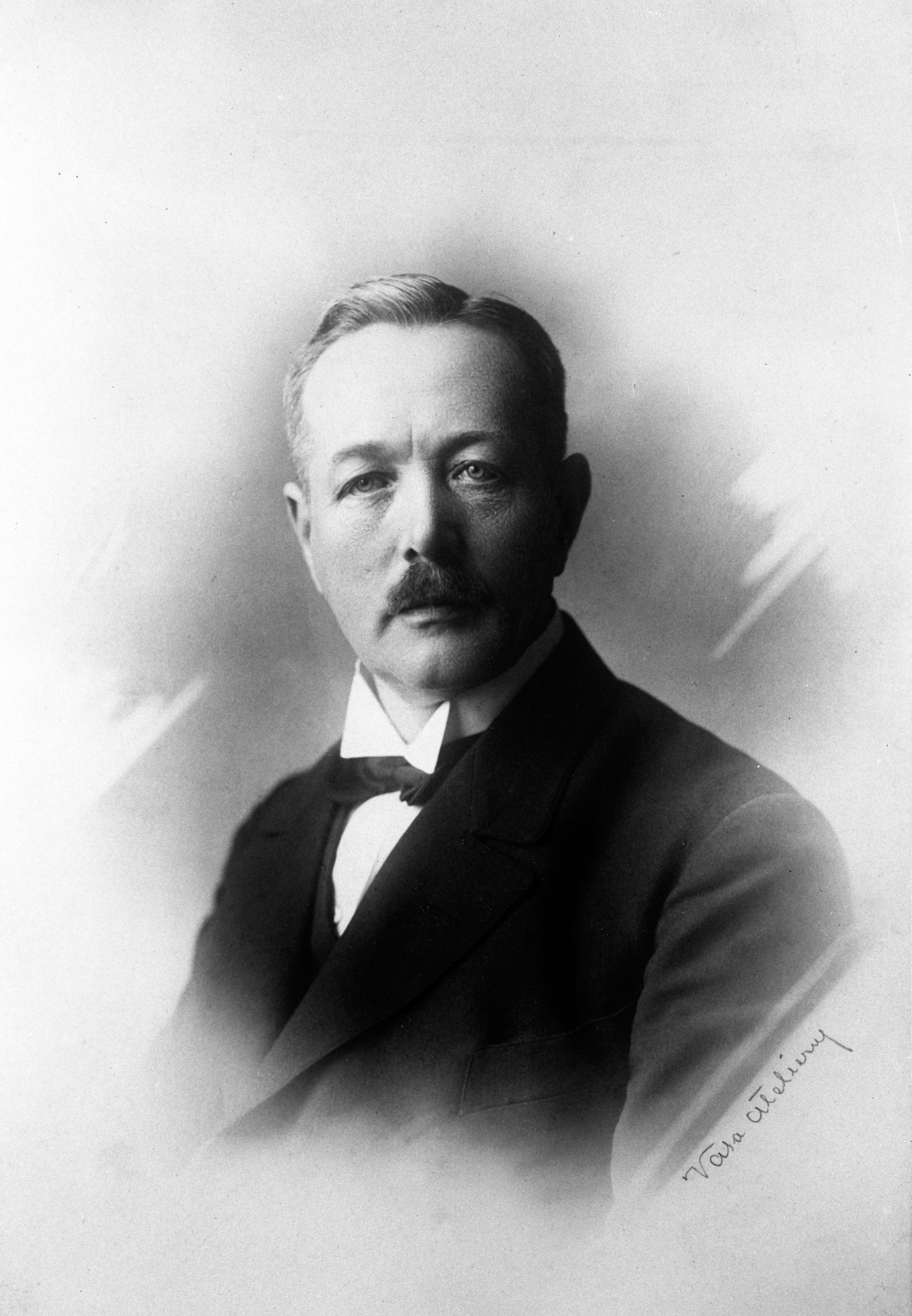 Herman Hjorton (1869-1923) föddes i Kvillinge, Östergötland. Han studerade medicin i Uppsala och blev legitimerad läkare 1903 och öppnade samma år en praktik i Huskvarna. Dr Hjortons pulver var först och främst var mot värk. Ett pulver som piggade upp och gav nya krafter vid arbetsplatsen i början av 1910-talet. Det kallades för Dr. Hjortons pulver och såldes receptfritt på apotek.